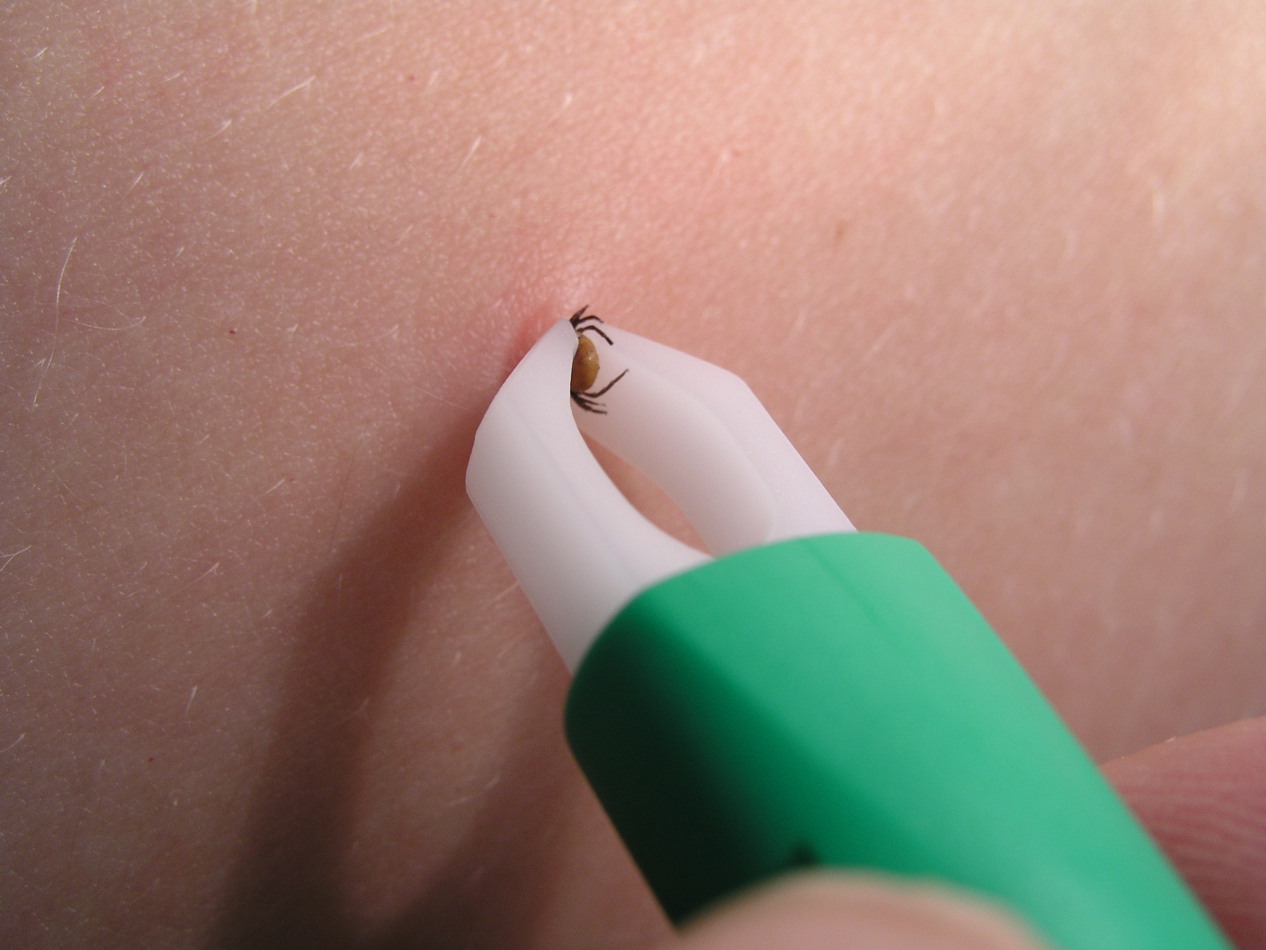 Het verwijderen van een teekje met de tekenpincet Removal of tick.